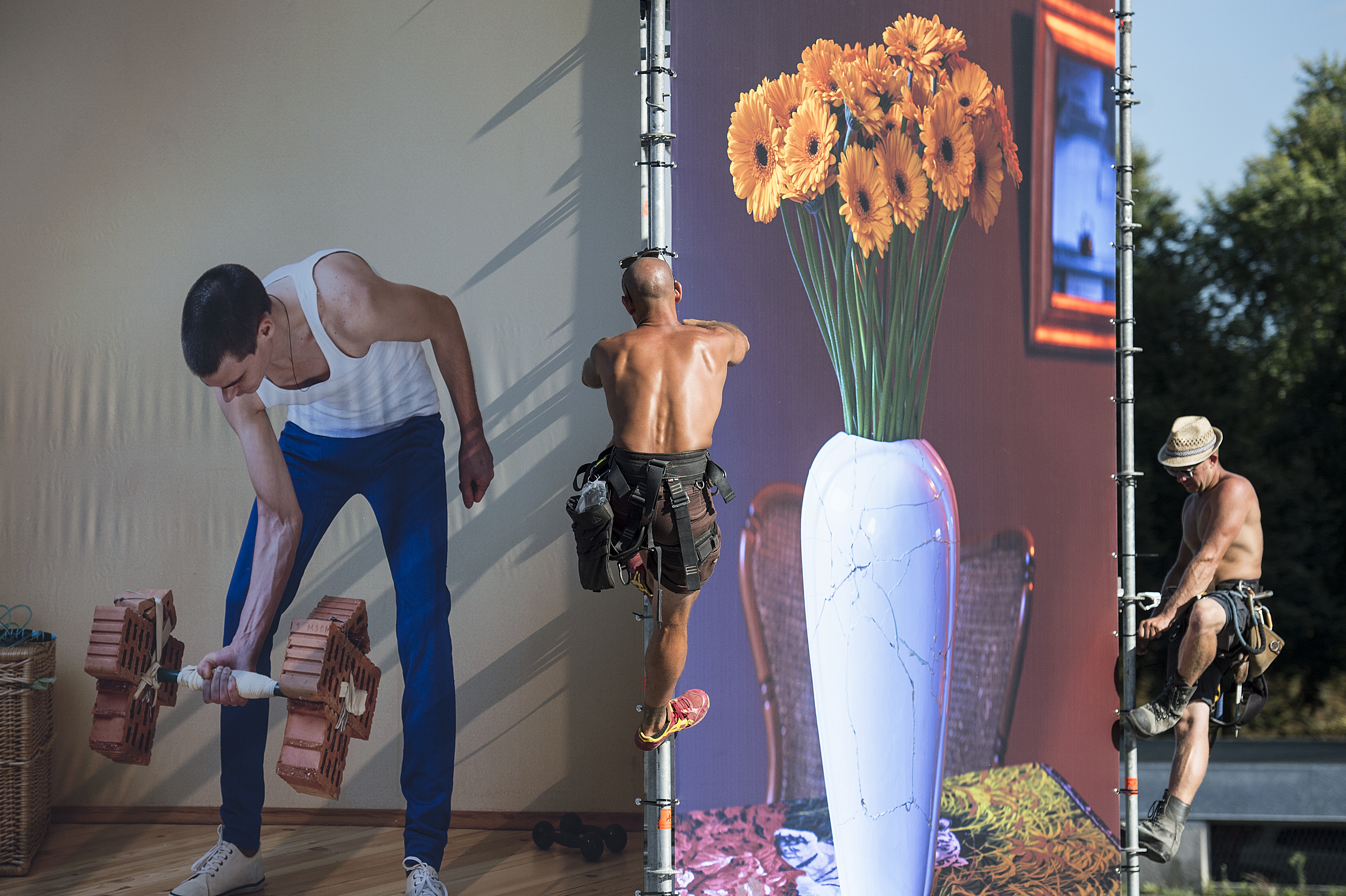 Twee vrijwilligers van BredaPhoto hangen de grote afdrukken van foto's van Alexey Shlyk op steigerstellages tijdens BredaPhoto Op de foto's die opgehangen worden staat een man met een gewicht, op de andere een gebarsten vaas De foto's van Alexey Shlyk komen uit zijn reeks 'The Appleseed Necklace'.